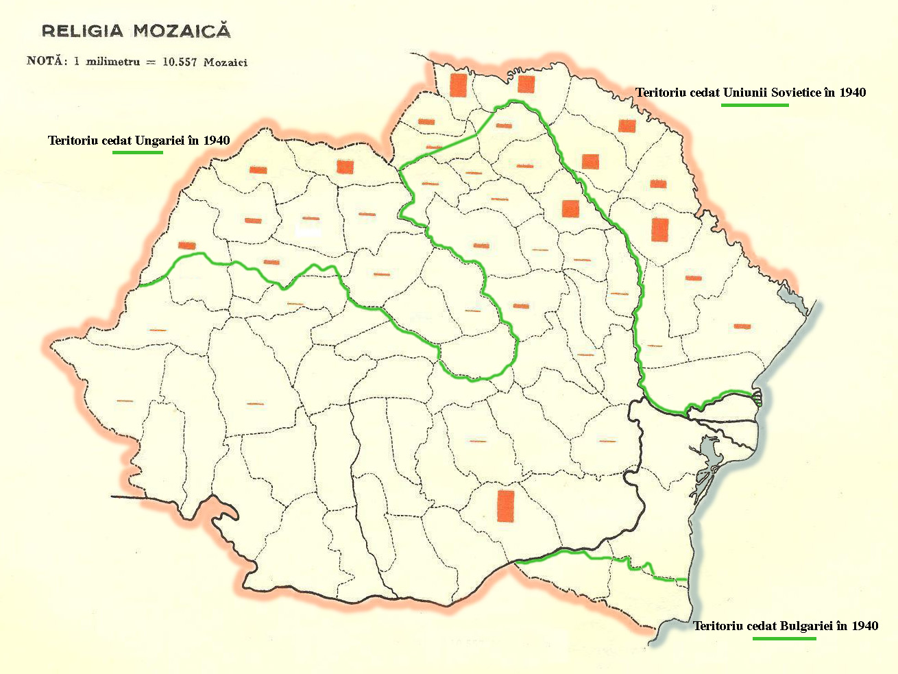 Religia mozaică în spațiul românesc conform recensământului populației din 1930